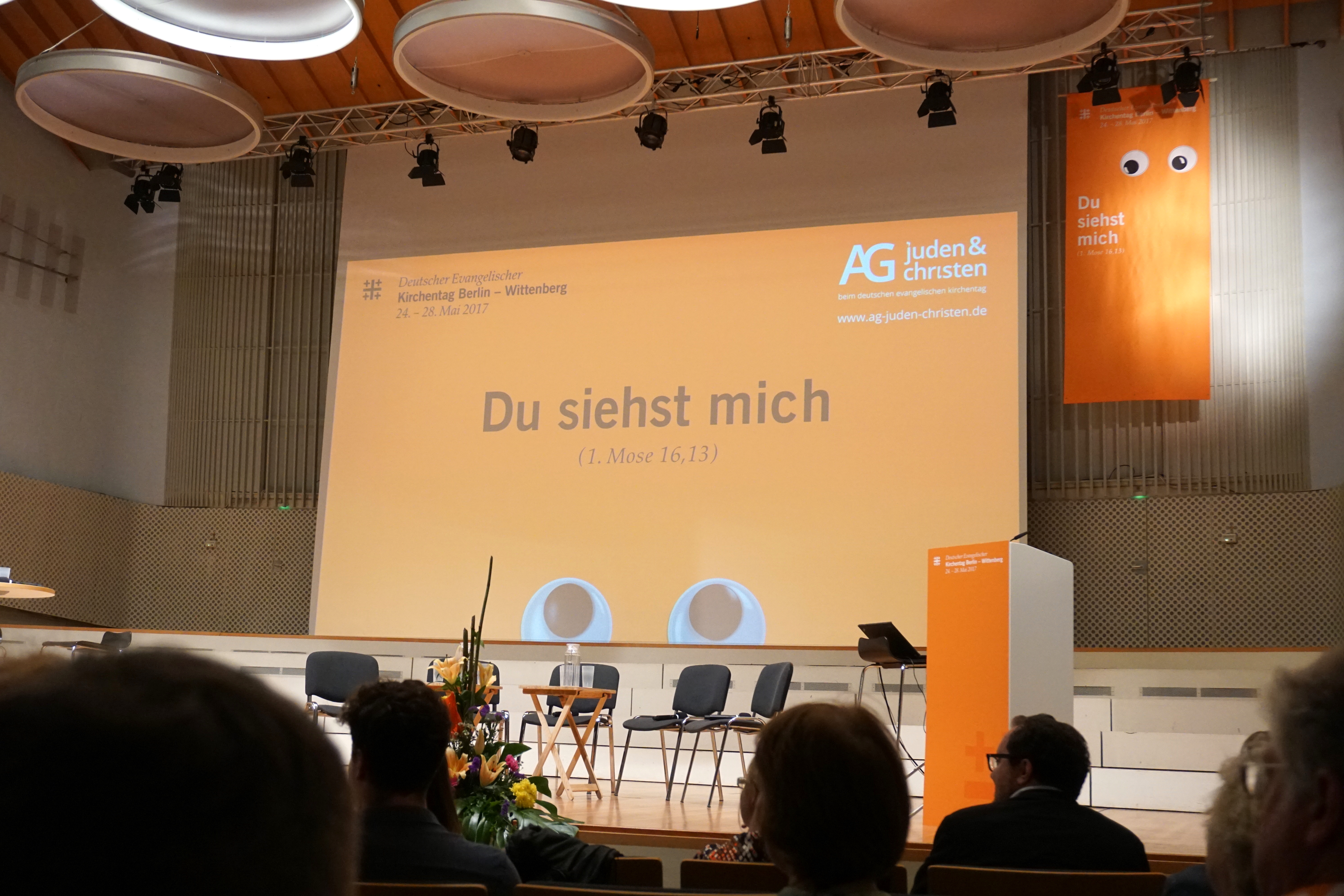 Podium des Zentrums Juden und Christen, Kirchentag 2017, Berlin (AG Juden und Christen beim Deutschen Evangelischen Kirchentag)